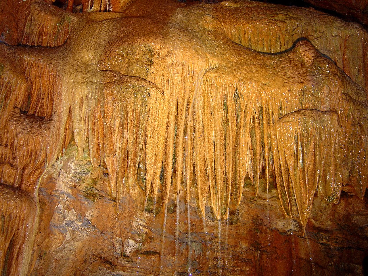 Esta formação cársica é chamada de "órgão".